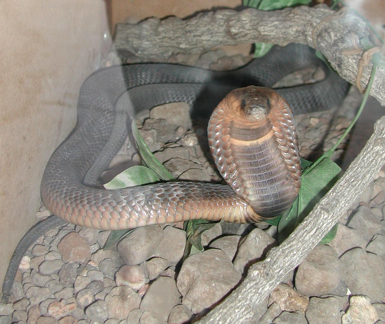 Cobra egípcia (Naja haje) "The crocodile ranch is also home to a modest collection of African snakes including this Egyptian Cobra (Naja haje) which put on a fine display without any prompting. There was also a Puff Adder (Bitis arietans--trenchant name, don't you think?) which hissed constantly all the time we were there." "This document is in the public domain."